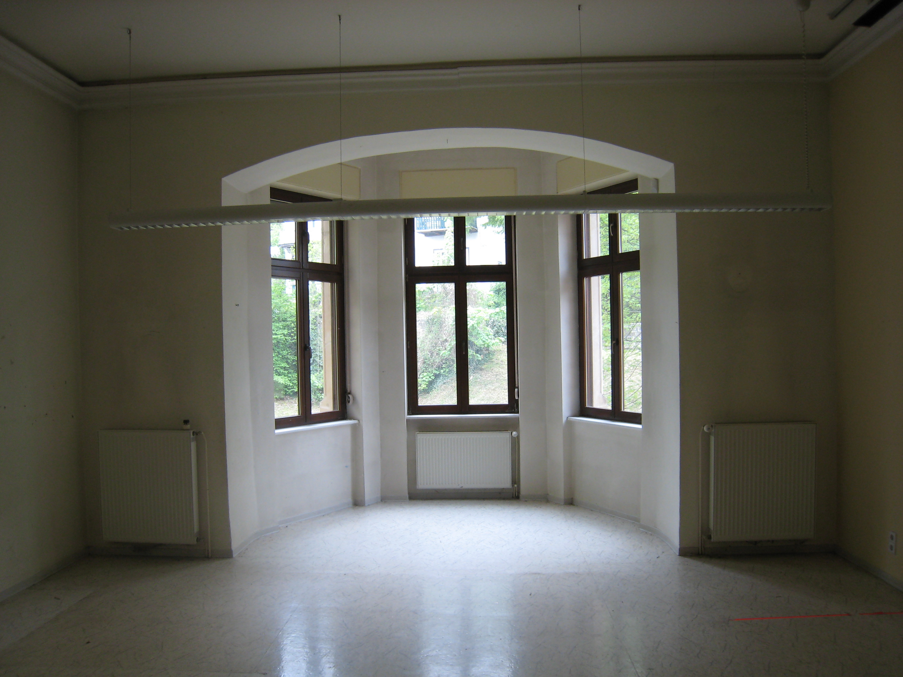 Raum im 2. Stock der Villa Franz (Arnstadt), gegen Westen